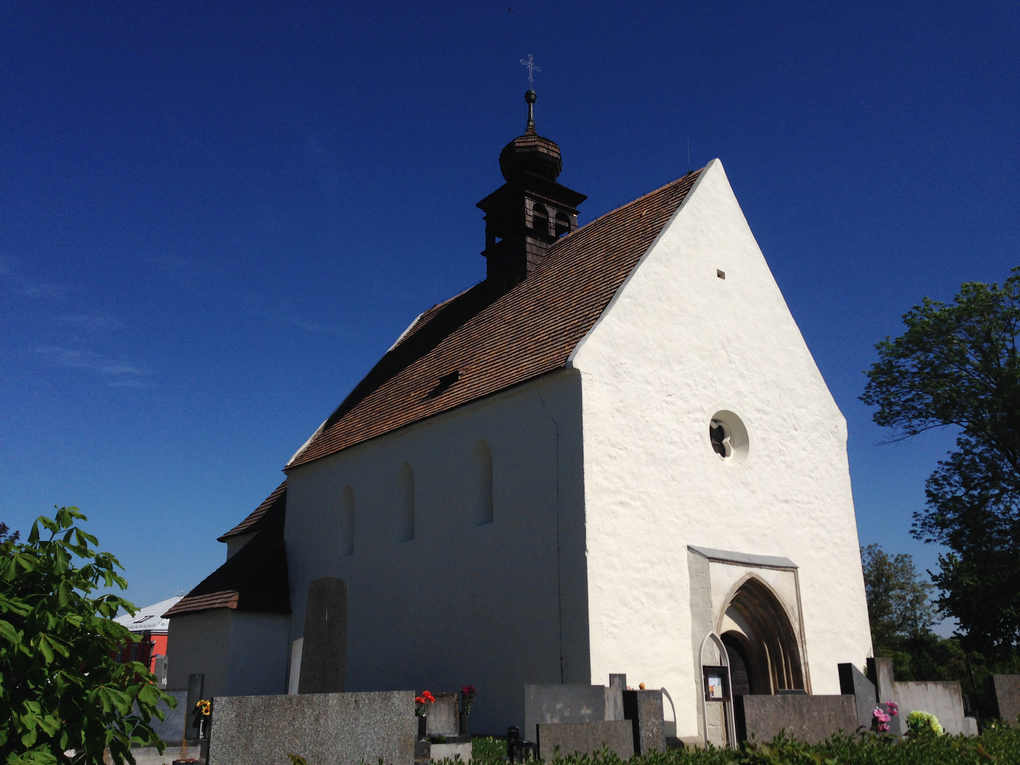 Severozápadní strana kostela